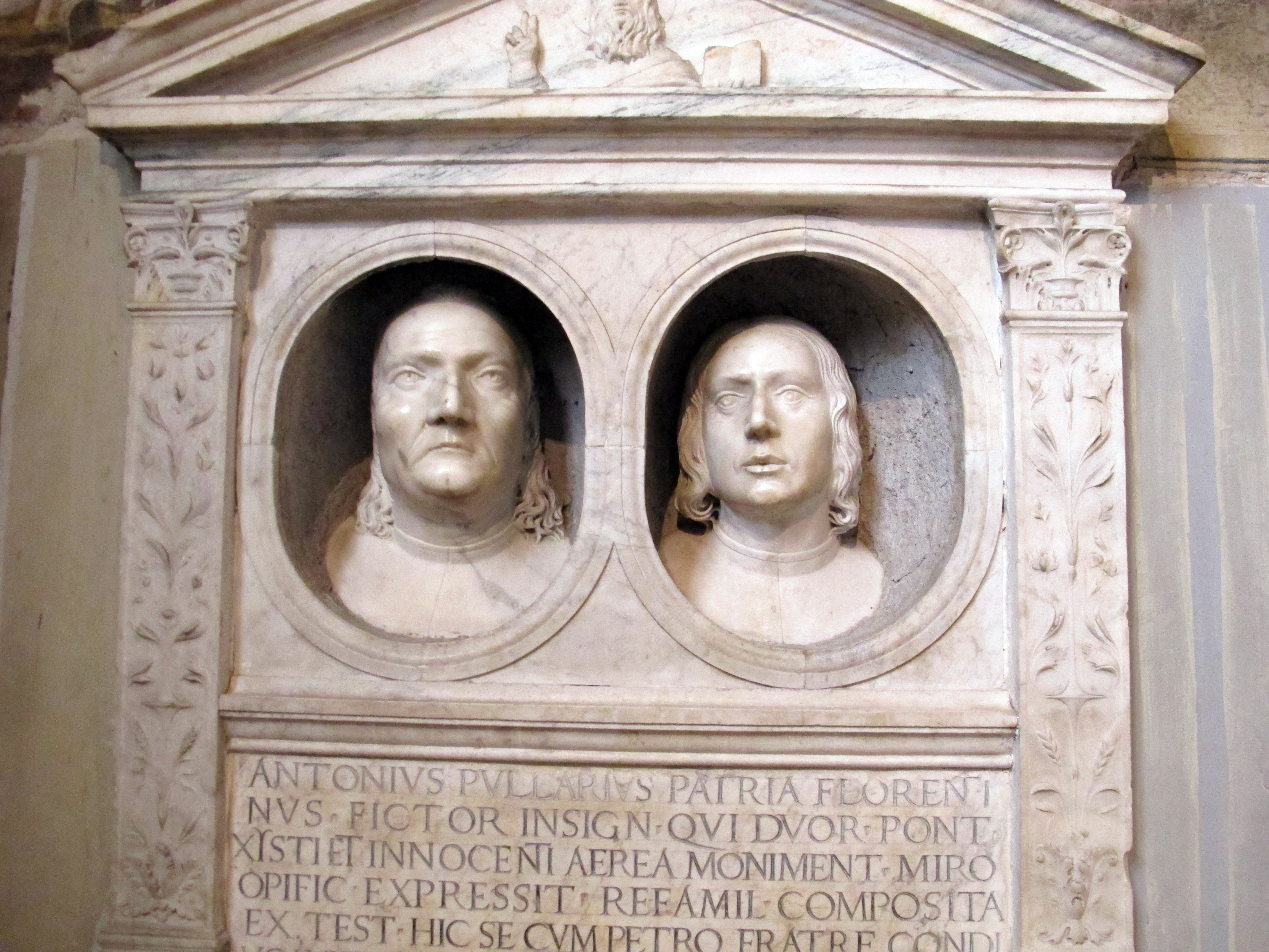 San pietro in vincoli, monumento ai fratelli del pollaiolo, di luigi capponi